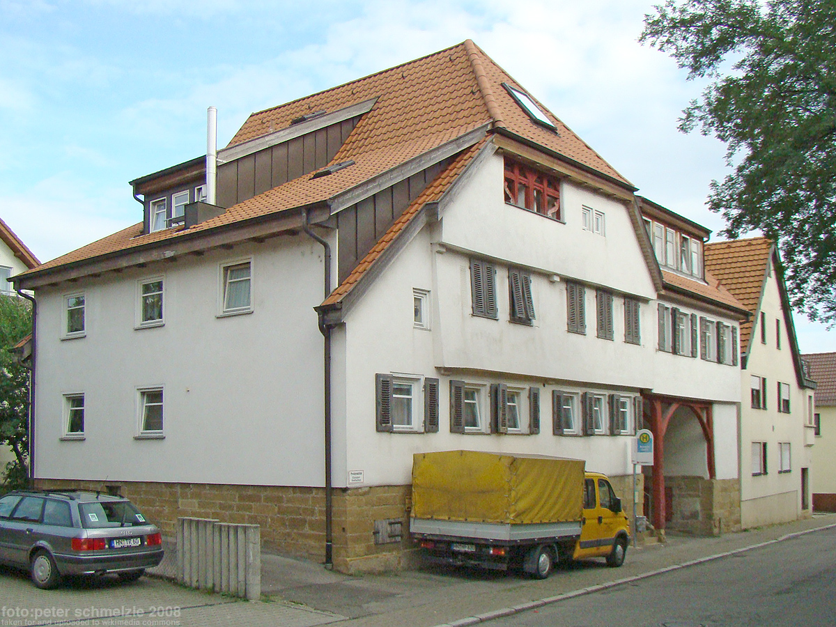 Denkmalgeschütztes Anwesen Böckinger Straße 7 in Heilbronn-Neckargartach